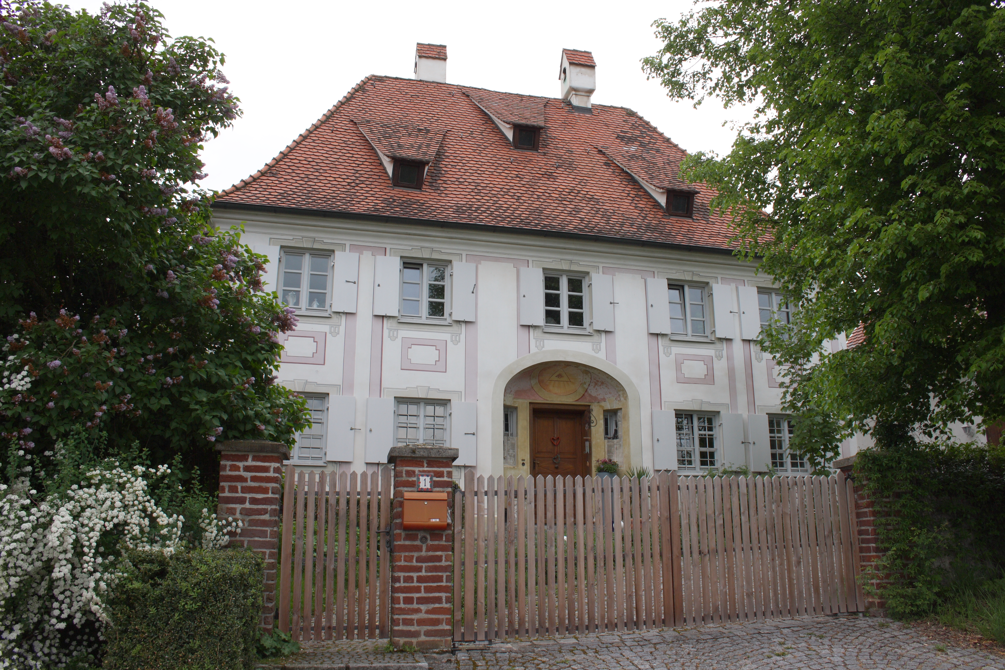 Pfarrhaus in Remshart, einem Ortsteil von Rettenbach im Landkreis Günzburg (Bayern), Haldenweg 1